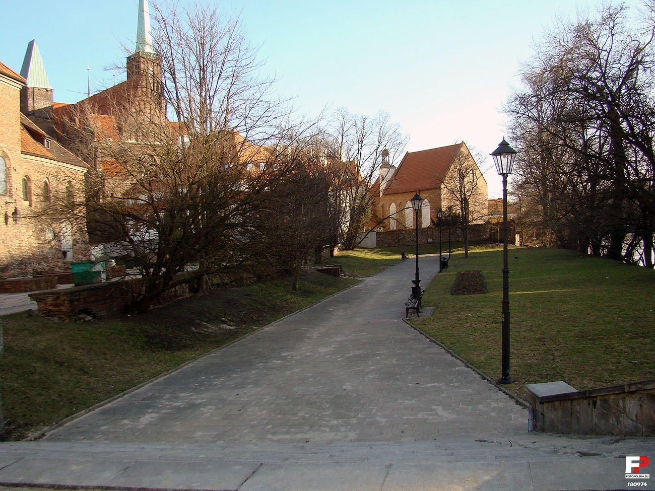 Bulwar ks. Aleksandra Zienkiewicza